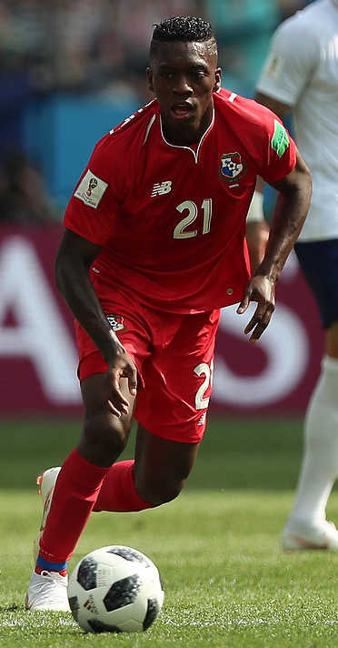 Сборная Англии сокрушила Панаму, Кейн оформил хет-трик